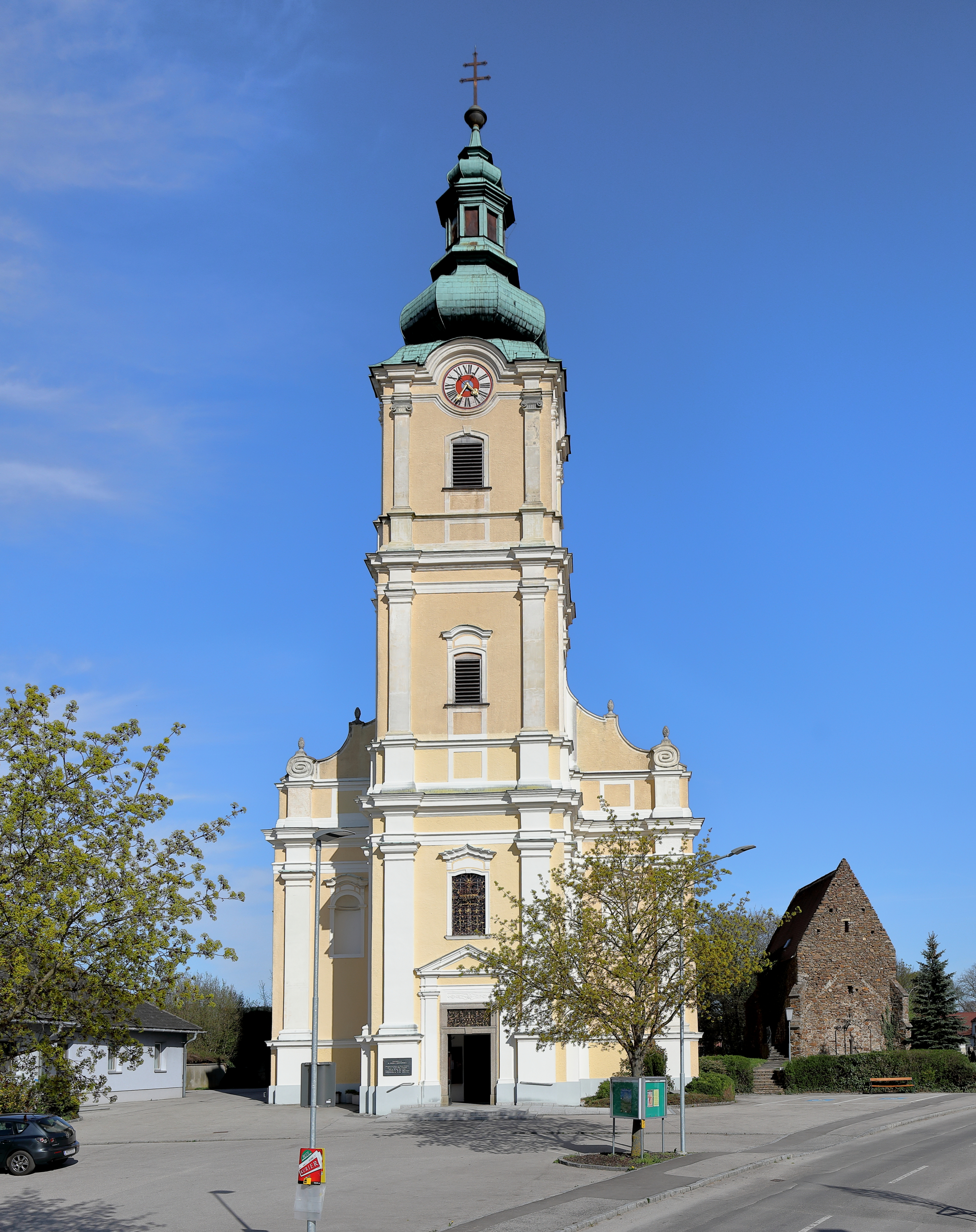 Die röm.-kath. Pfarrkirche hl. Lorenz in der niederösterreichischen Marktgemeinde Loosdorf und rechts der Karner.Die Kirche mit einem 4-jochigen Langhaus und einem eingezogenen 2-jochigen Chor wurde in den 1570er/1580er Jahren errichtet. Die Turm und die Westfassade stammen aus den 1730er Jahren. Südöstlich der Kirche befindet sich ein Karner, der im 14. Jahrhundert errichtet wurde.